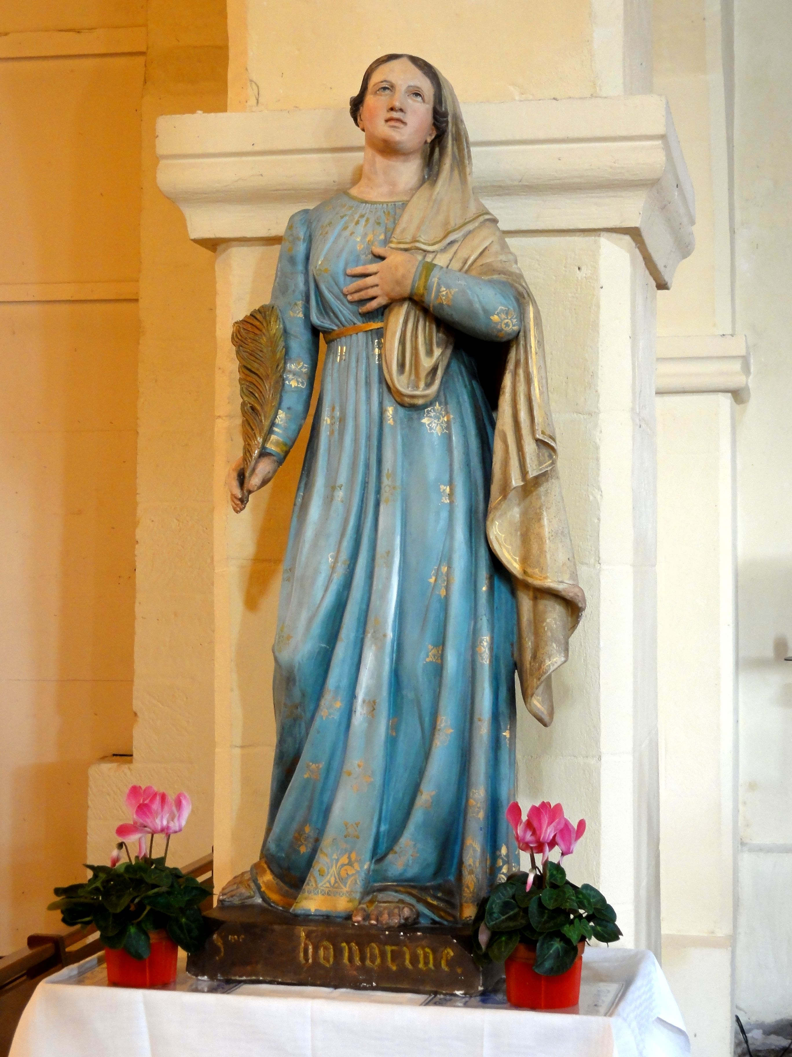 Statue de sainte Honorine, plâtre moulée, 1866. Elle forme un ensemble avec la statue de sainte Marguerite.